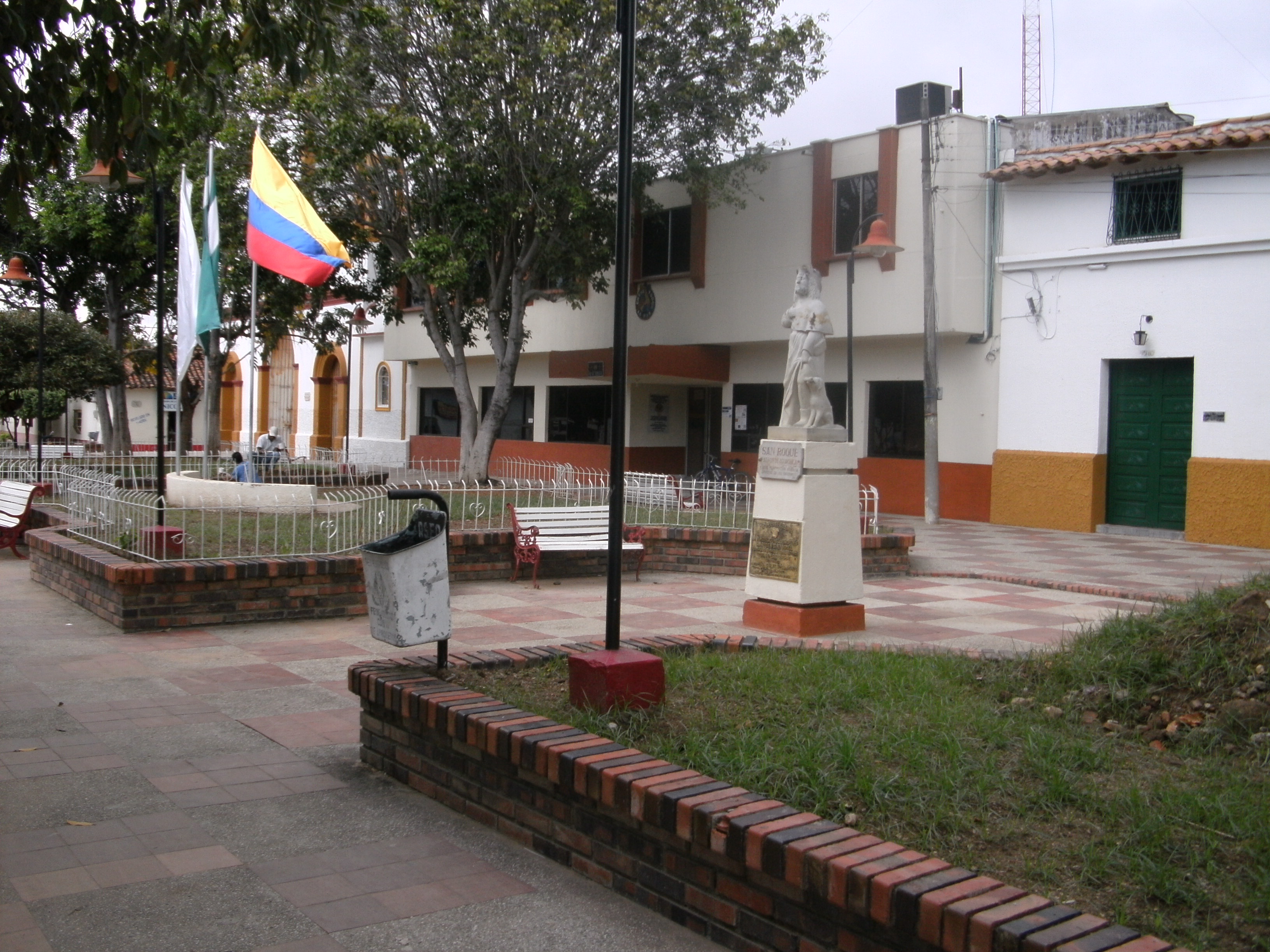 Alcaldía Municipal.